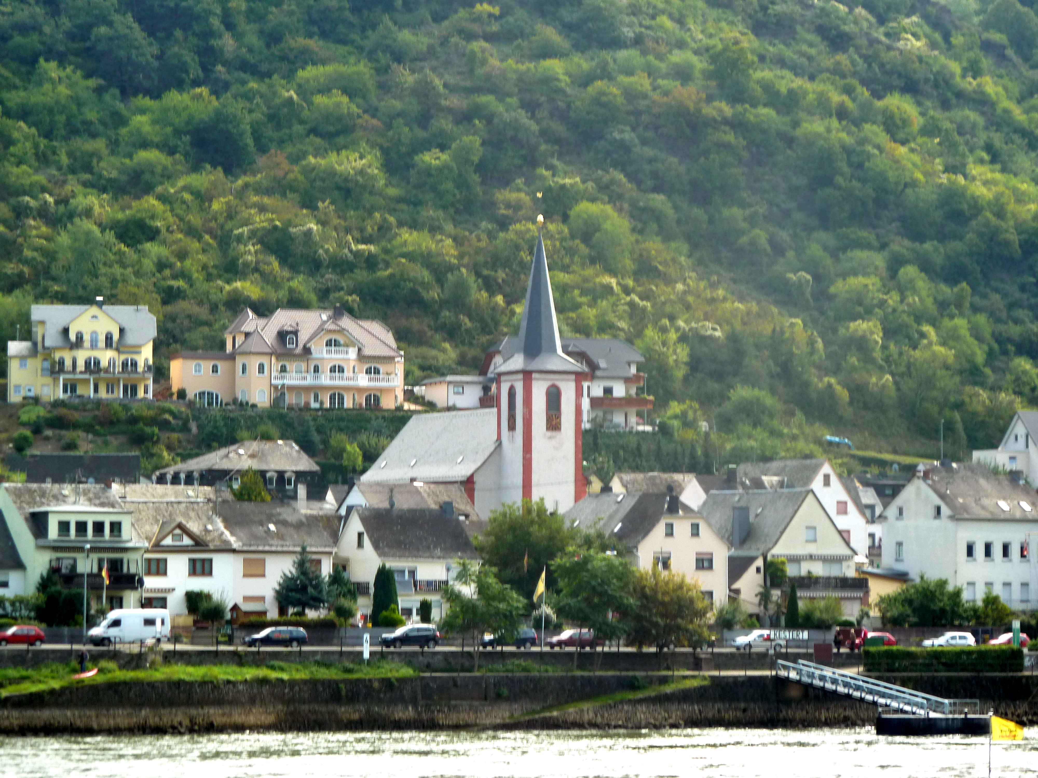 Die Kirche St. Georg in der Ortsgemeinde Kestert